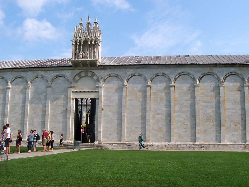 Pisa - Camposanto